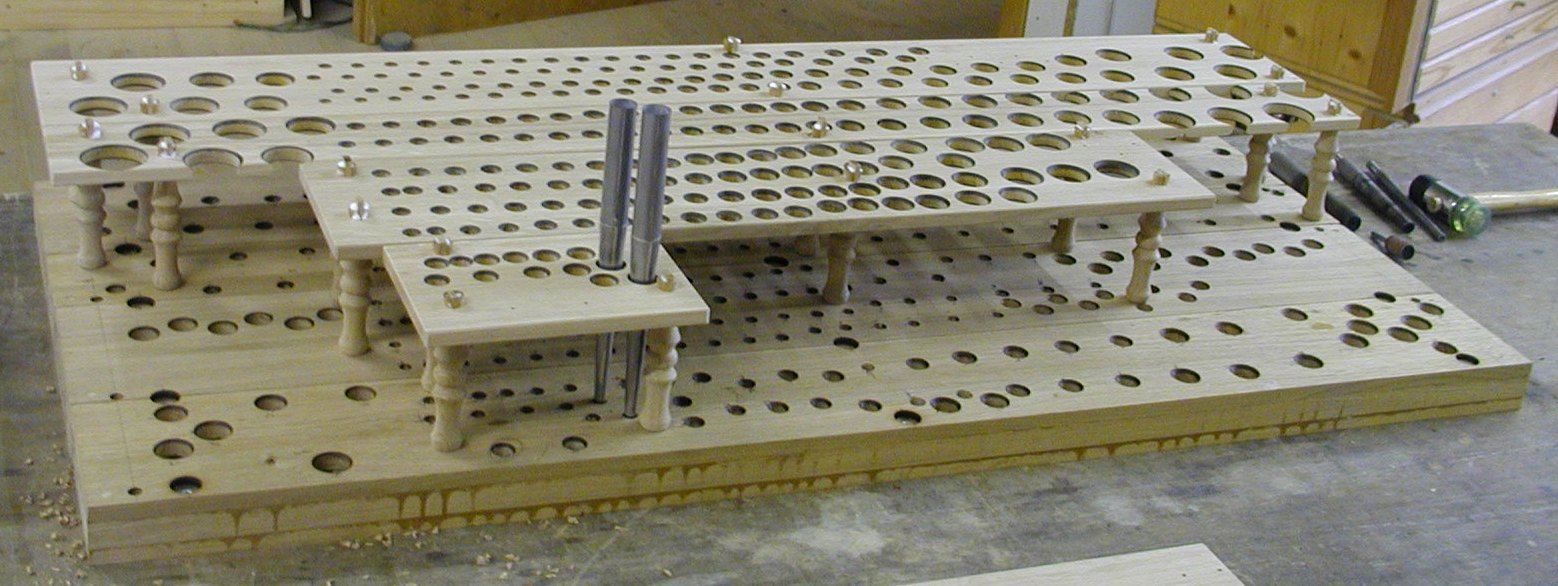 Vormontierter Pfeifenstock in einer Orgelbauwerkstatt.